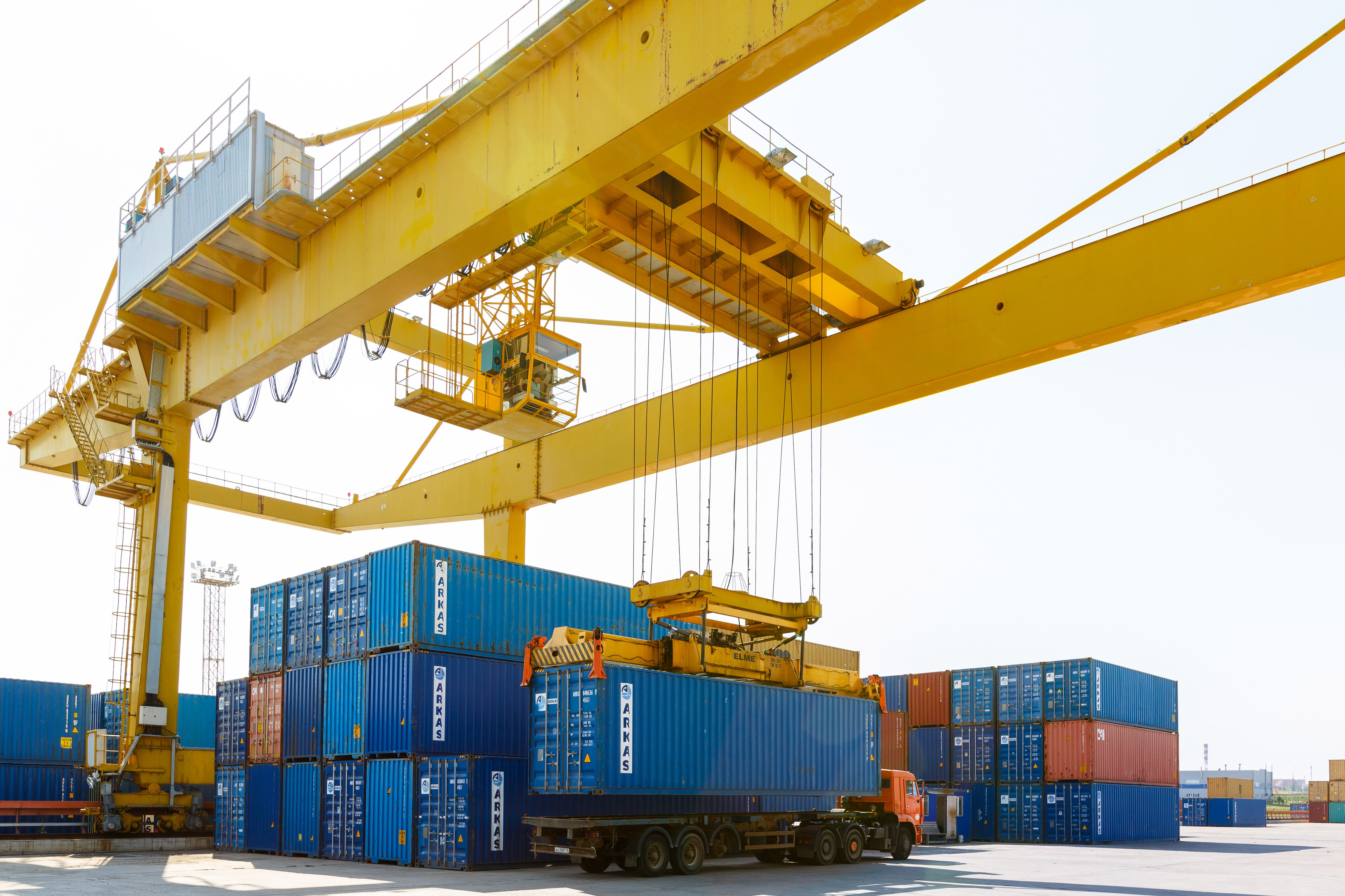 Особая экономическая зона «Алабуга», контейнерная площадка